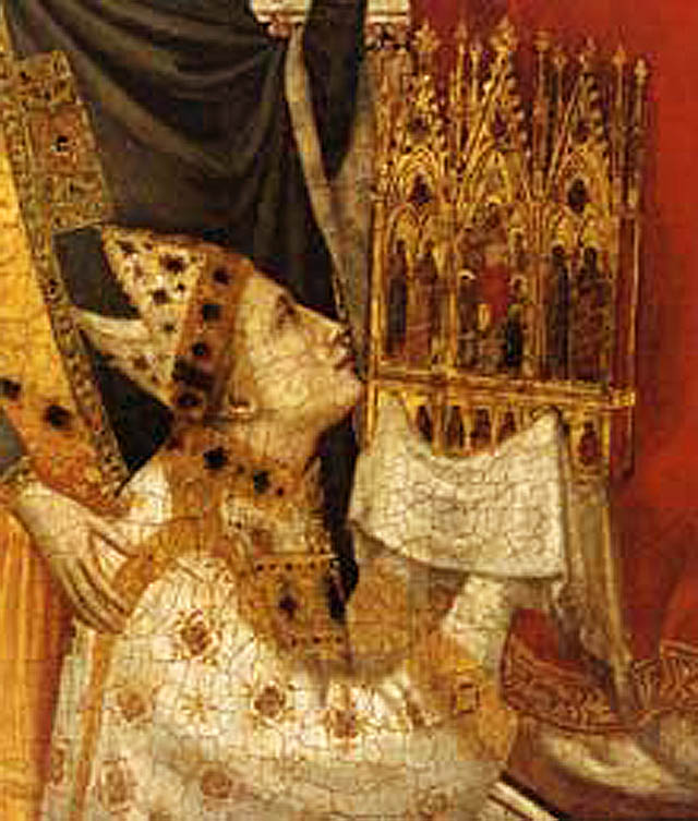 Cardinal Giacomo Stefaneschi